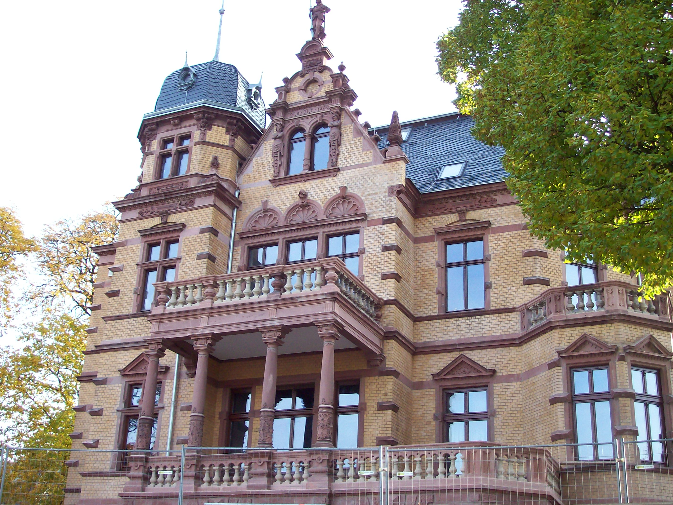 Die Rheinfront der Villa Belgrano in Boppard